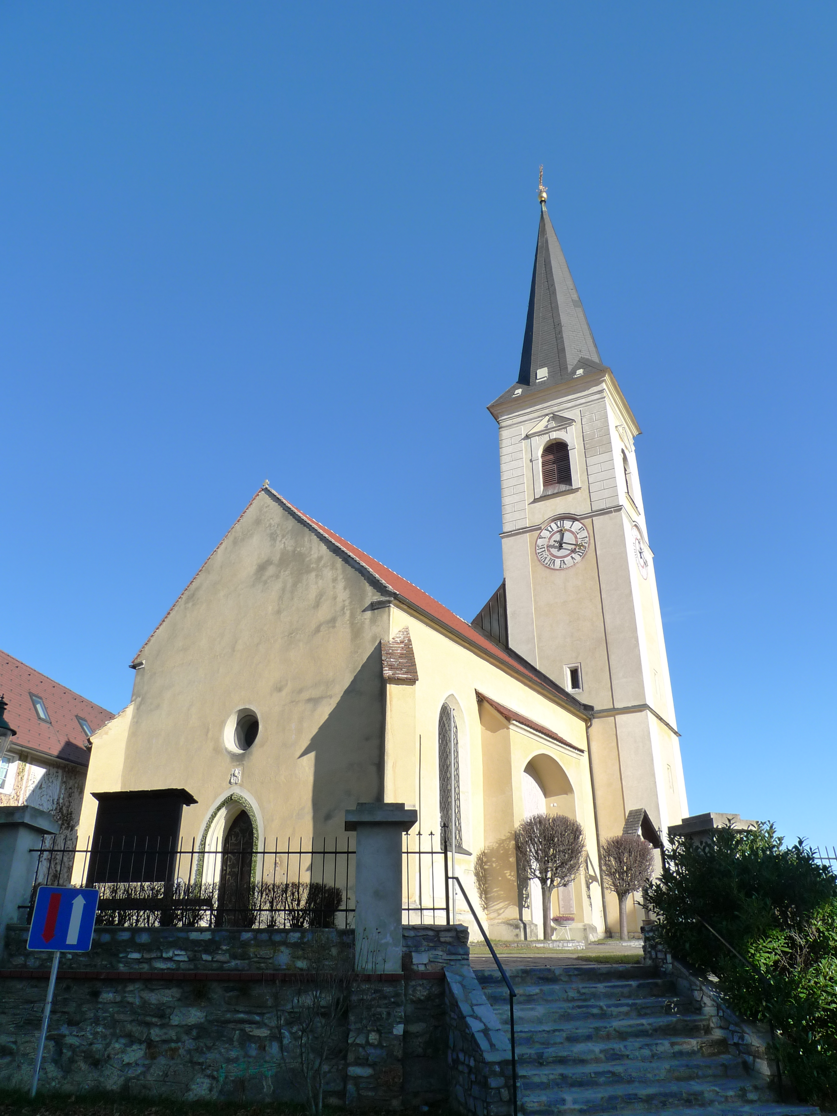 Kath. Pfarrkirche hl. Radegundis mit ehem. Friedhof, Umfriedung, Treppenanlage und Nebengebäude